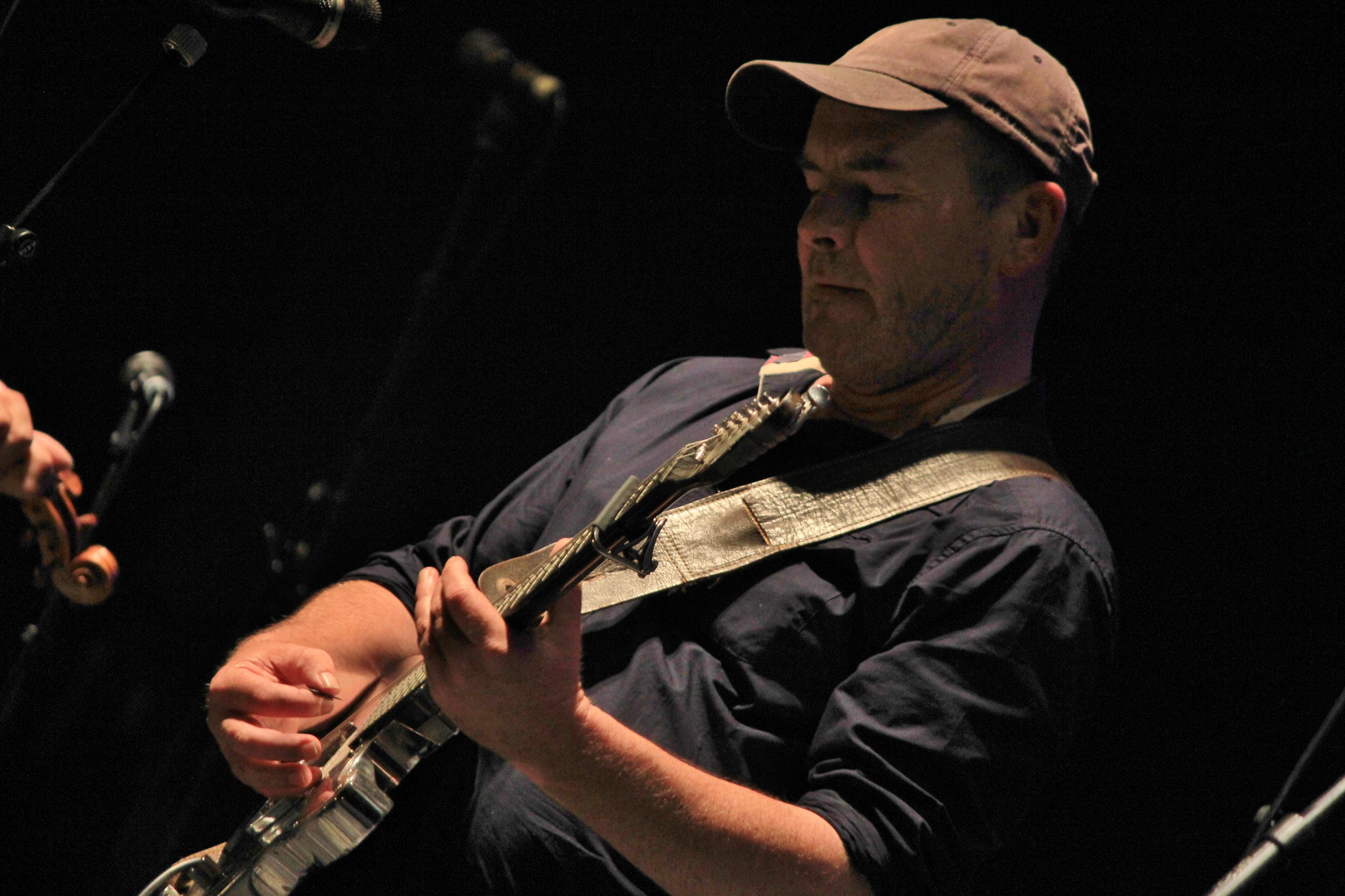 Concert de Red Cardell et du Bagad Kemper lors du festival interceltique de Lorient.